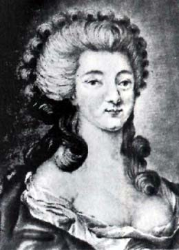 La Comtesse de la Motte, L'AFFAIRE DU COLLIER DE LA REINE, 18th century